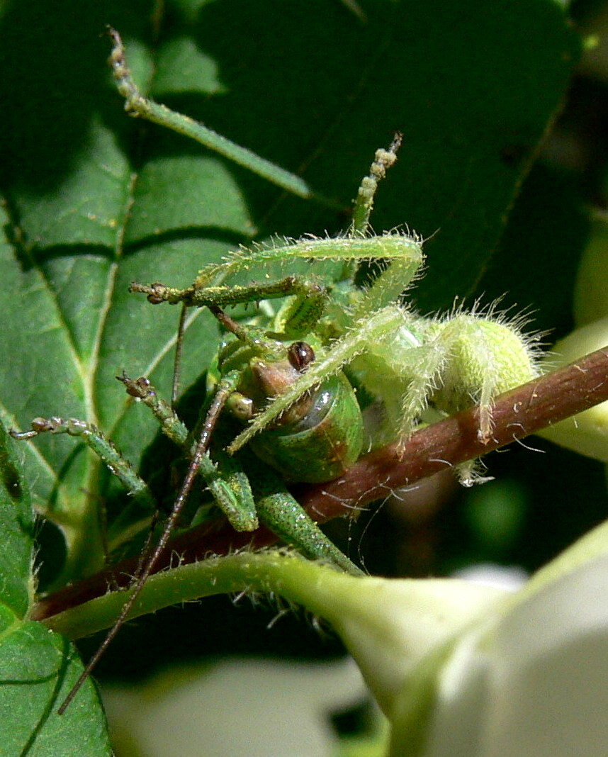 Araignée (Heriaeus sp.) dévorant un criquet. Spider (Heriaeus sp.) devouring a grasshopper. It's not Micrommata but probably Heriaeus sp. Auteurs Jodelet/Lépinay.